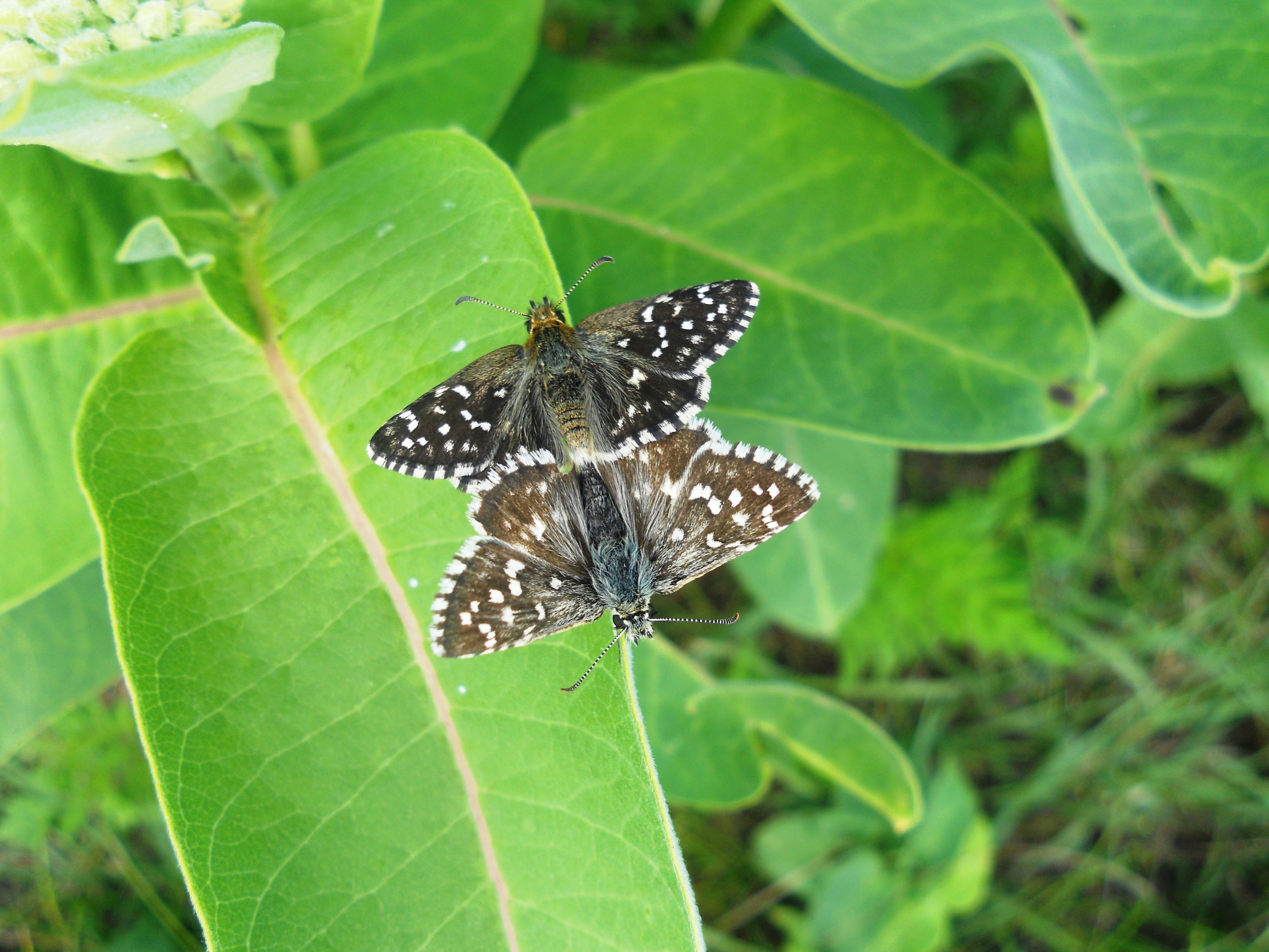 Najčešći pirgavac u Evropi i kod nas. Javlja se na slatinsko-stepskim staništima.